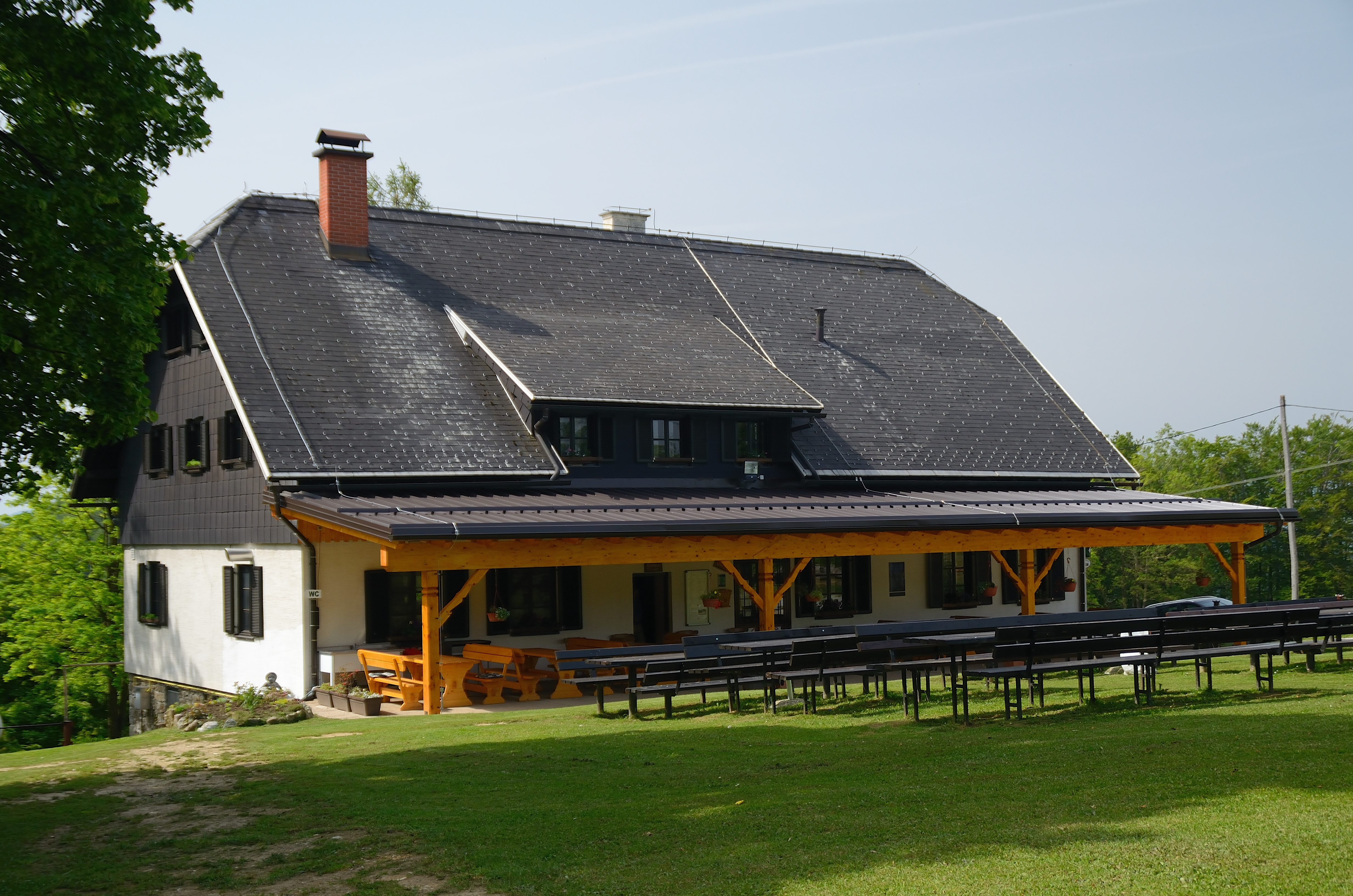 koča na Šmohorju nad Laškim